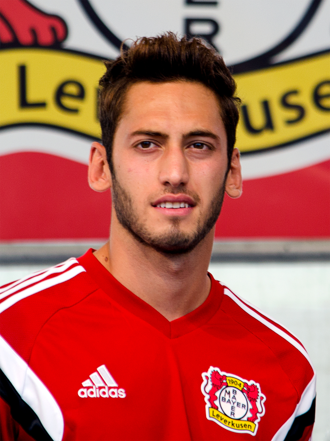 Hakan Calhanoglu, türkischer Fußballspieler